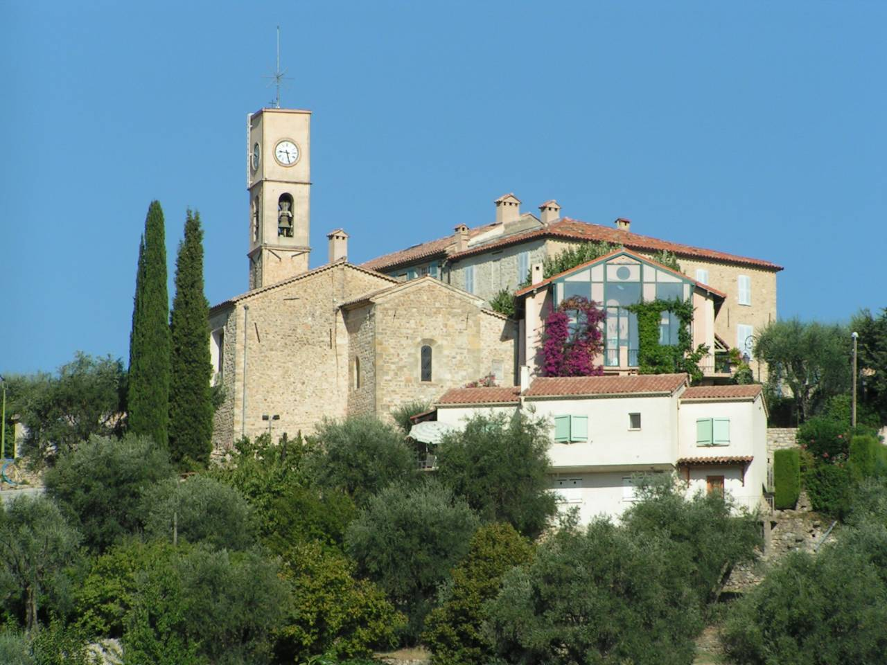 Opio Village in France.